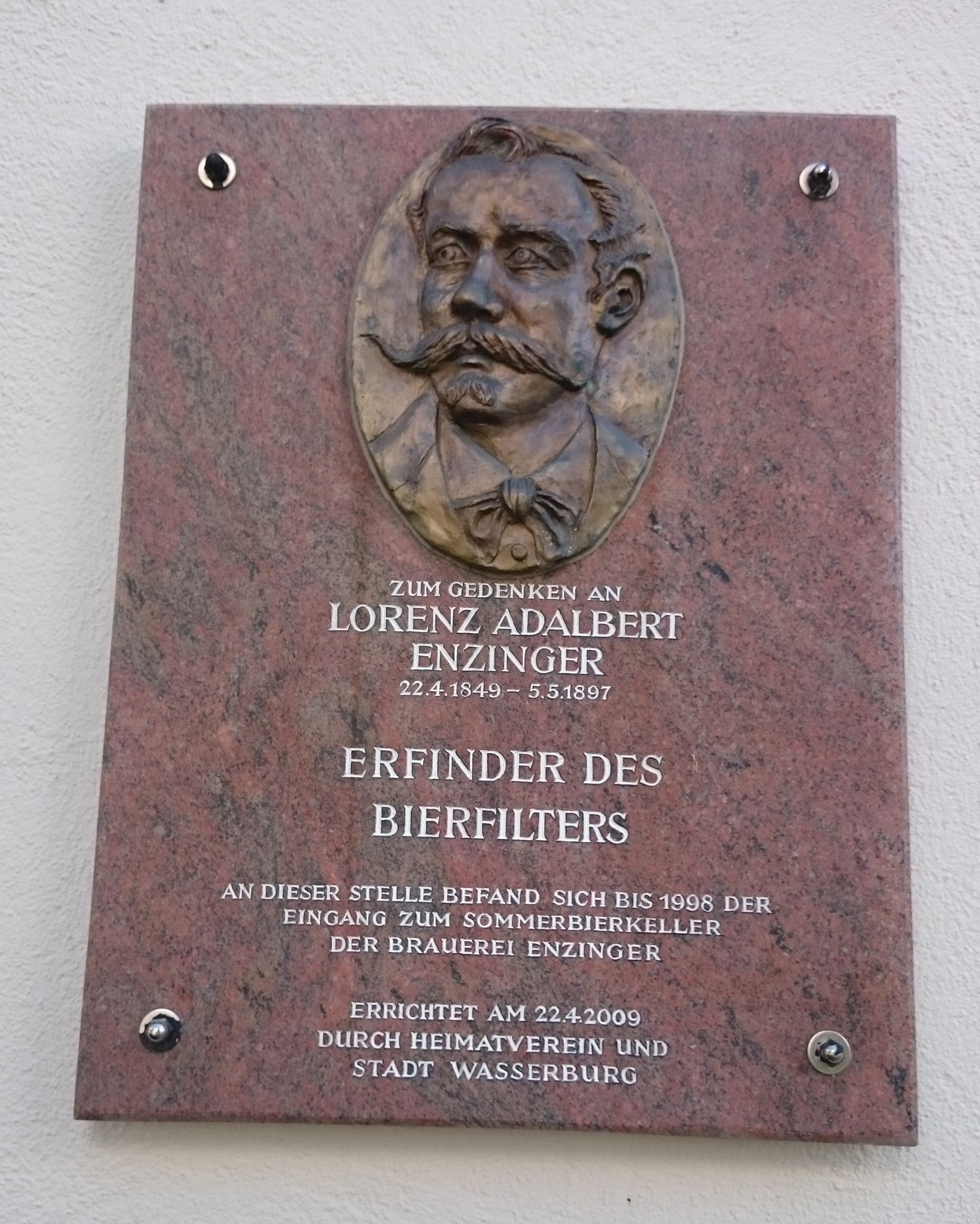 Stadtarchiv Wasserburg am Inn